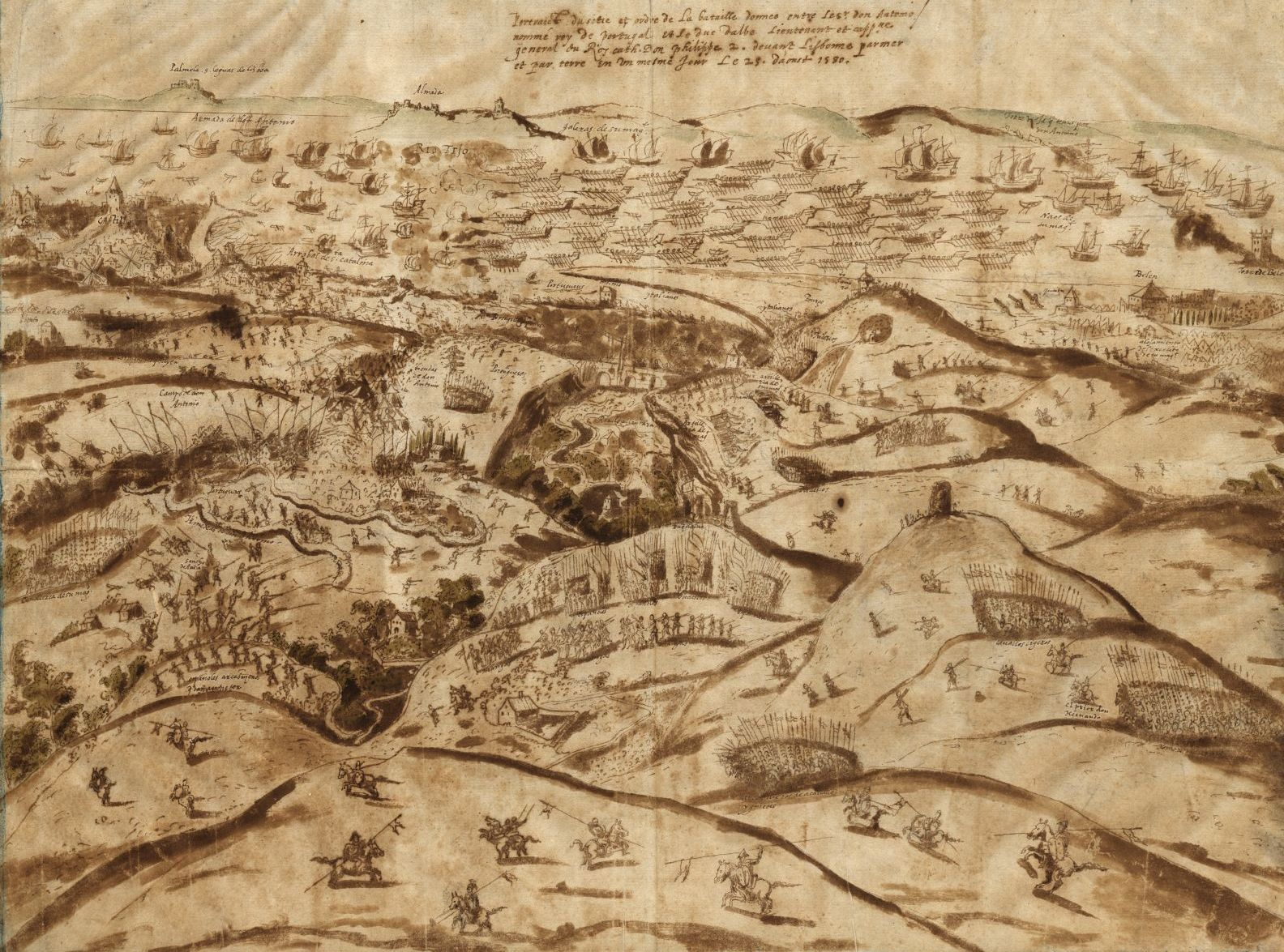 « Portraict du sitie et ordre de La bataille donnee entre Le sr. don Antonio nommé roy de portugal et Le duc dalbe Lieutenant et capp.ne general du Roy cath. Don philippe 2. deuant Lisbonne par mer et par terre en un mesme jour Le 25. d'aoust 1580 ».